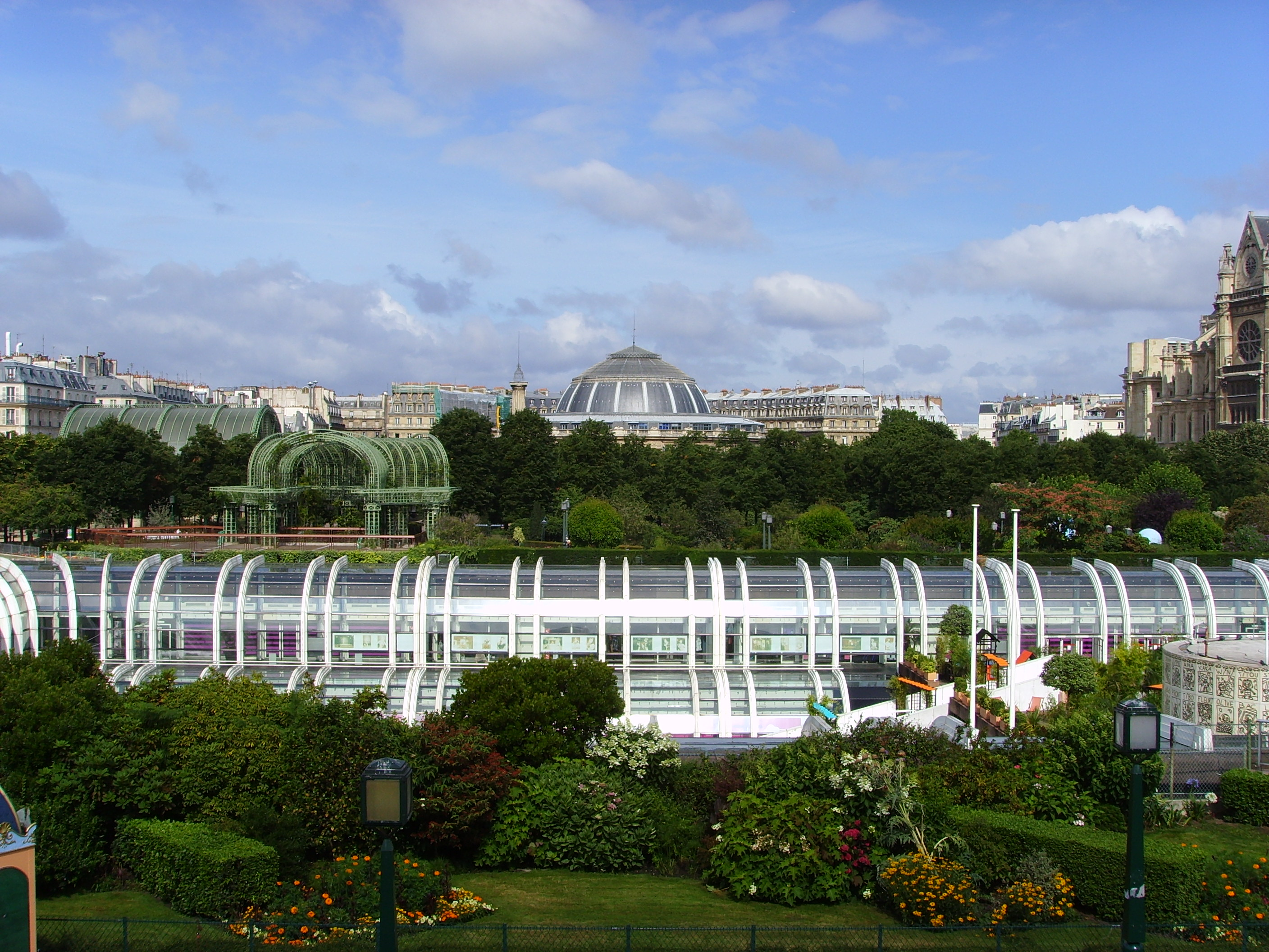 Les Halles, Paris